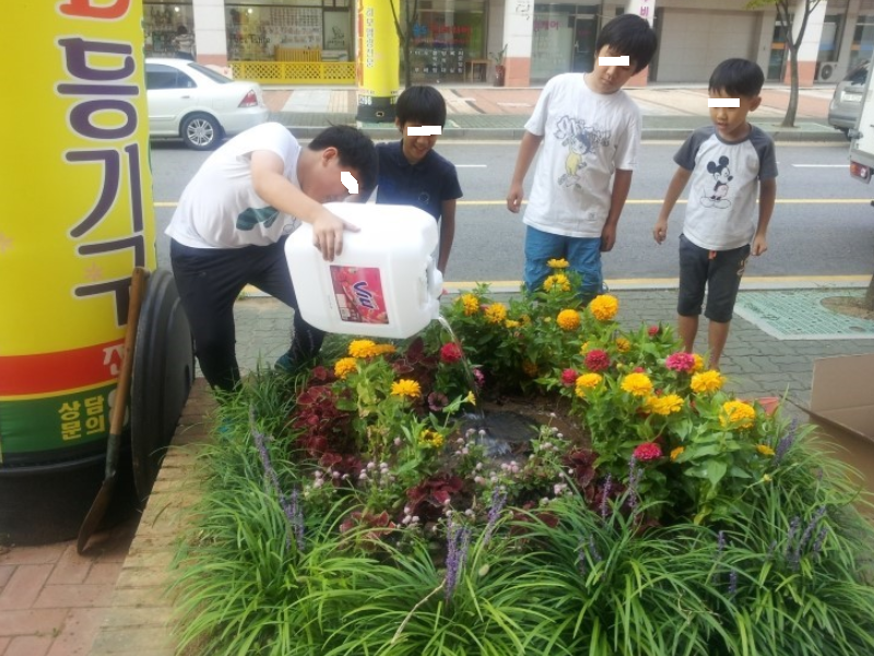 2014년 9월 2일 부모님의 권유로 자녀와 그 친구들이 인천시 송도에서 게릴라 가드닝을 하였다. 부모님은 아이들이 사회에 도움이 되는 인물로 성장하기를 바라는 마음에서 이번 행사를 진행하였다고 한다.